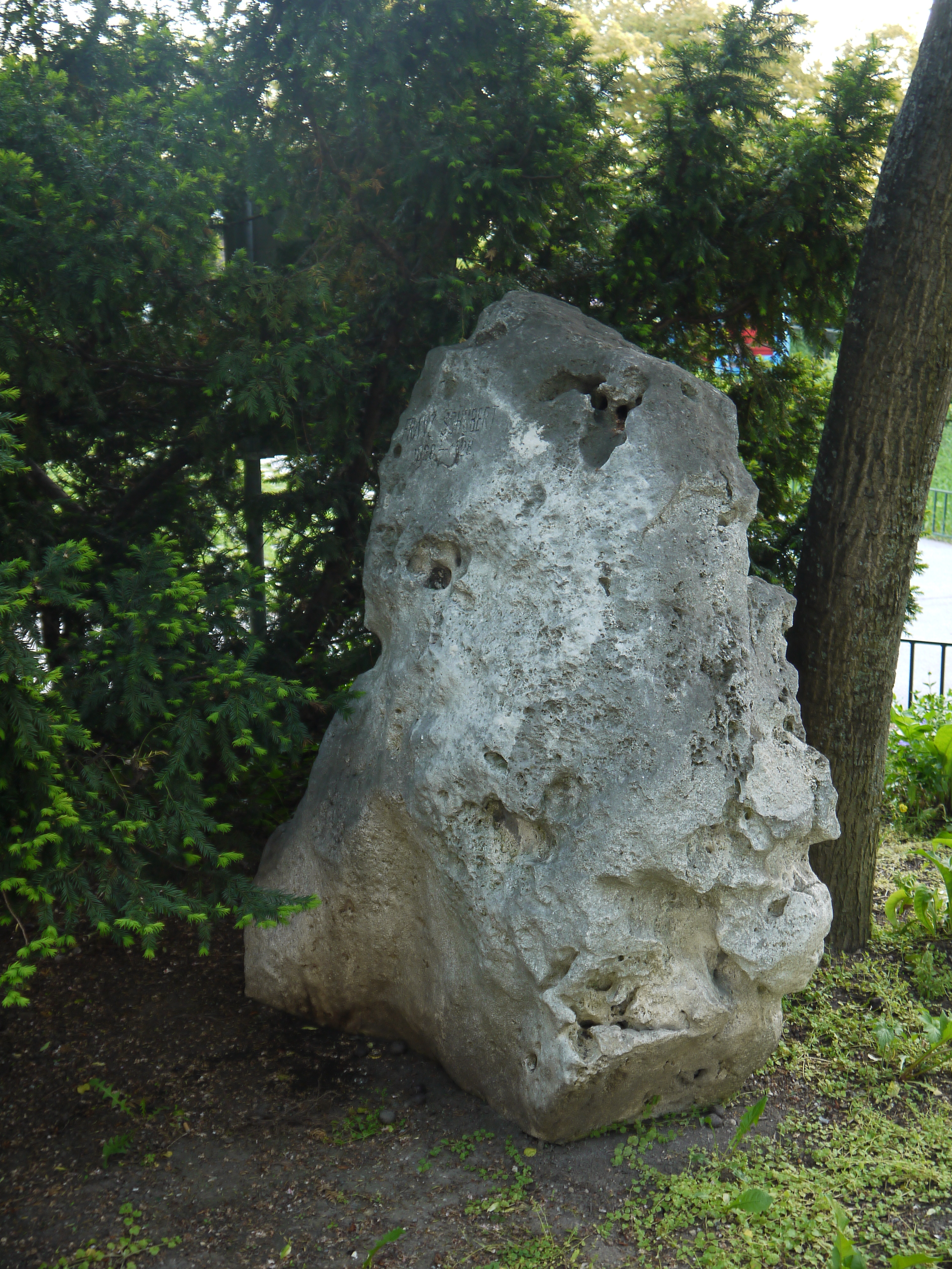 Gedenkstein Franz Schubert - Denkmal